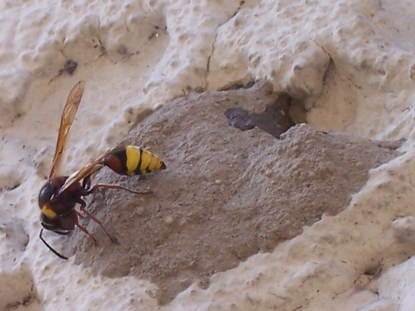 Große Lehmwespe (Delta unguiculata) mit Nest (während dem Bau) an einer Hauswand. Die dunklen Stellen sind frisch von ihr bearbeitet.